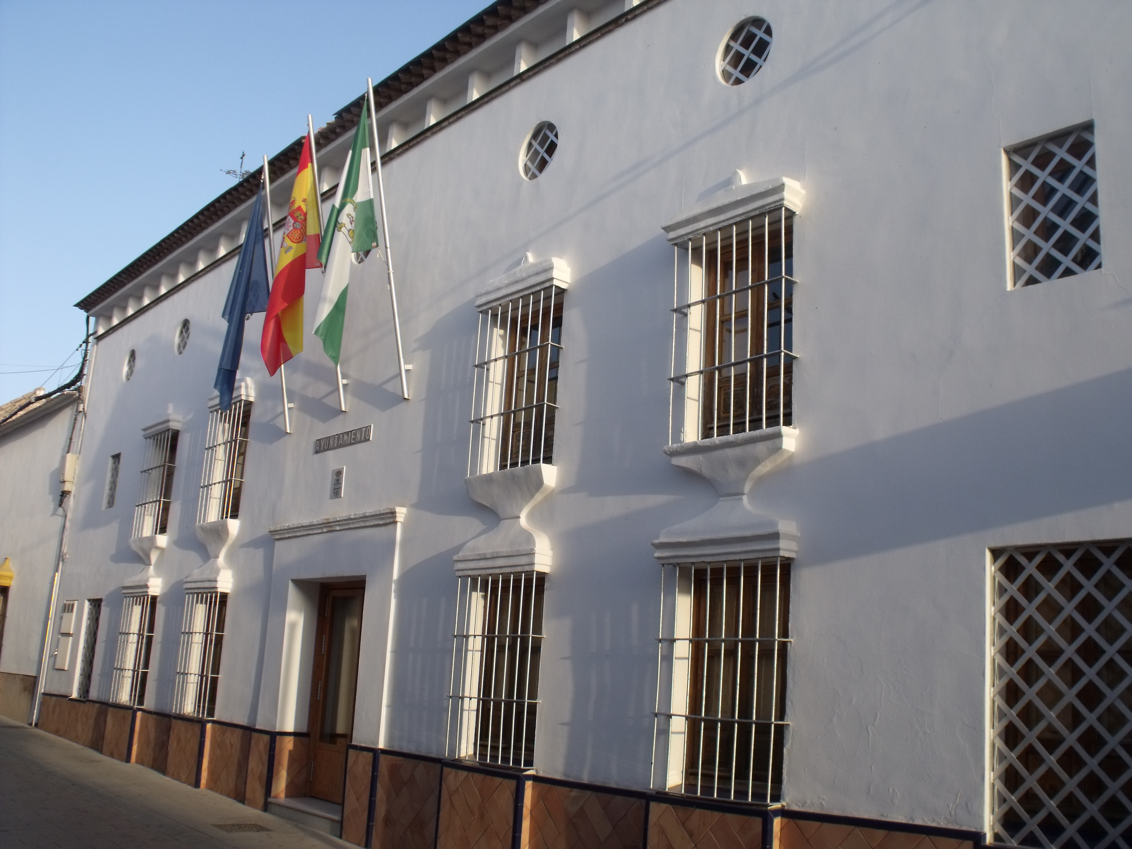 Vista general del ayuntamiento del pueblo